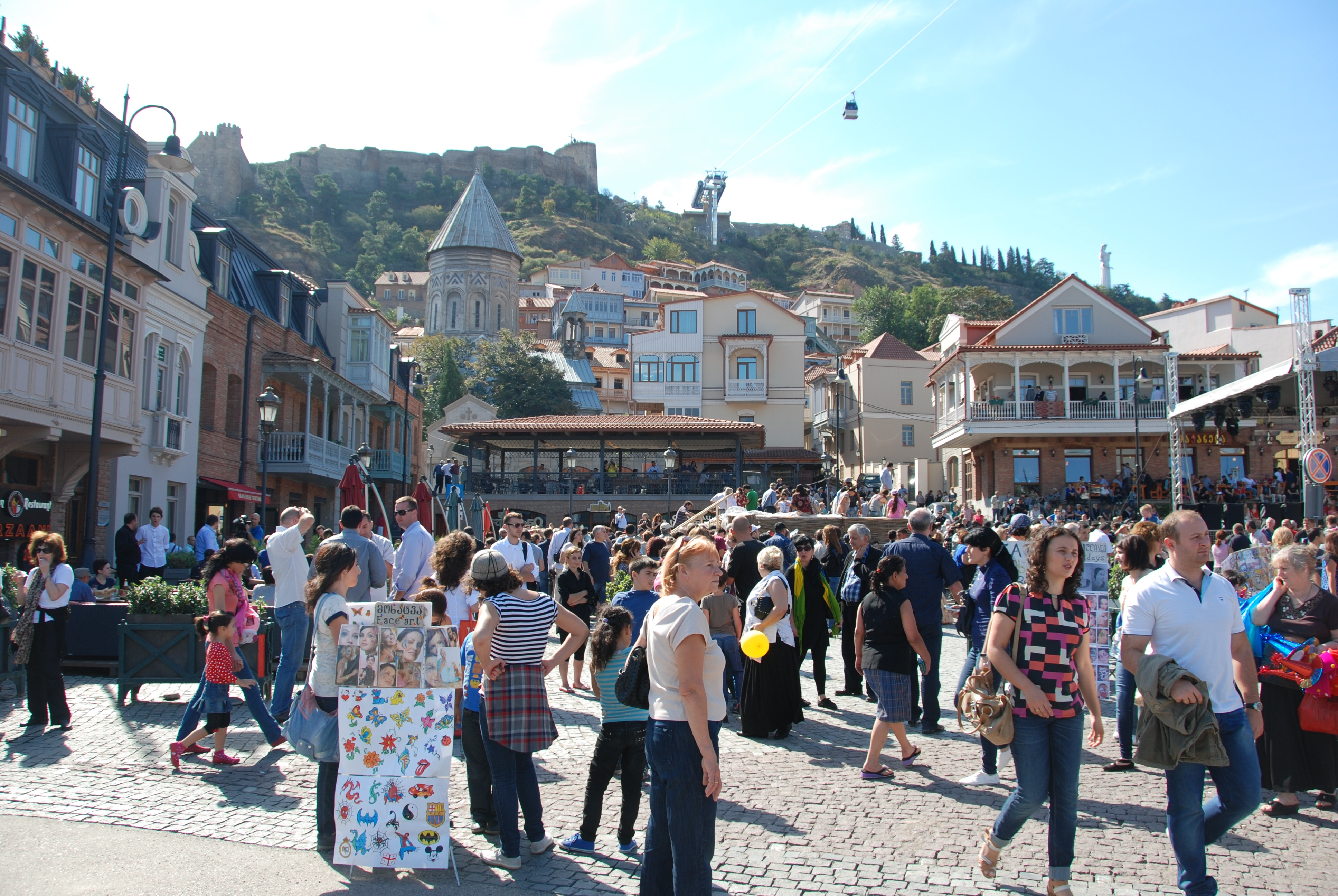 Праздник сбора урожая и города Тбилиси в первые выходные октября.